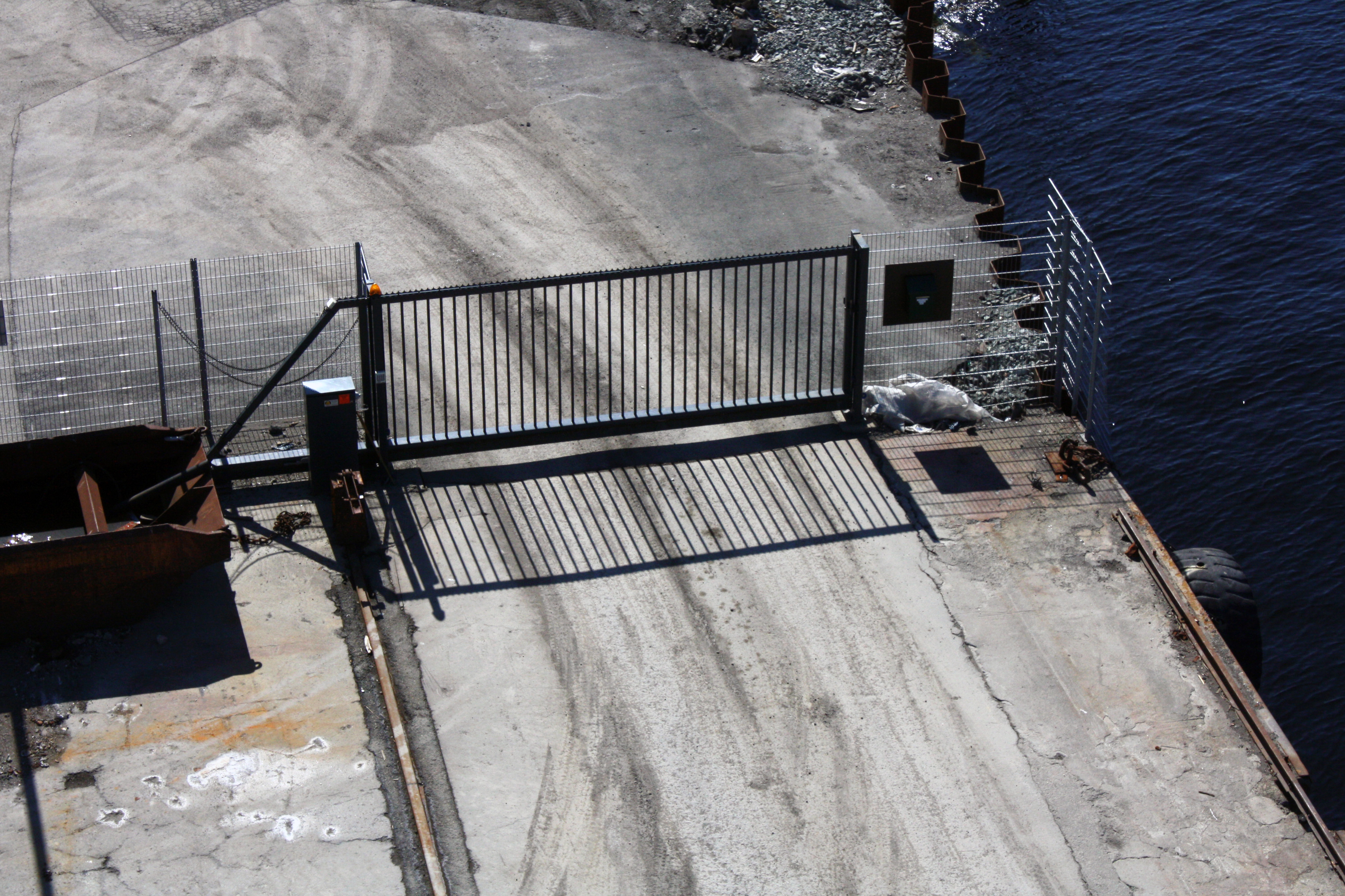 Sikkerhetsport og -gjerde inn til ISPS-området på Kullkranpiren på Nyhavna.